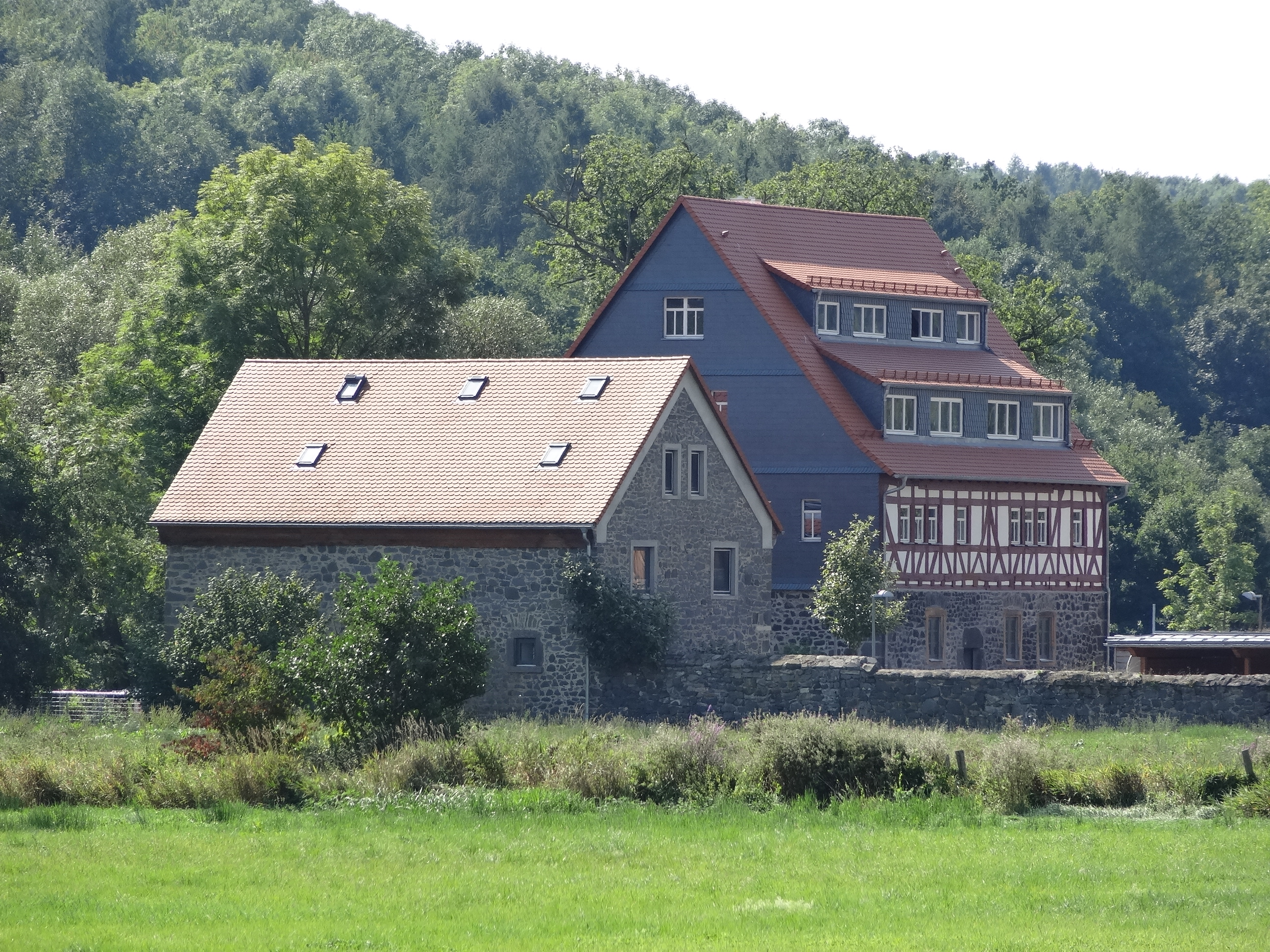 Hofgut Kolnhausen